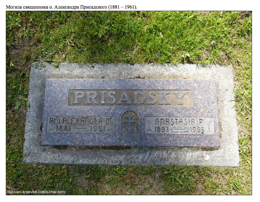 Могила А.М. Присадского